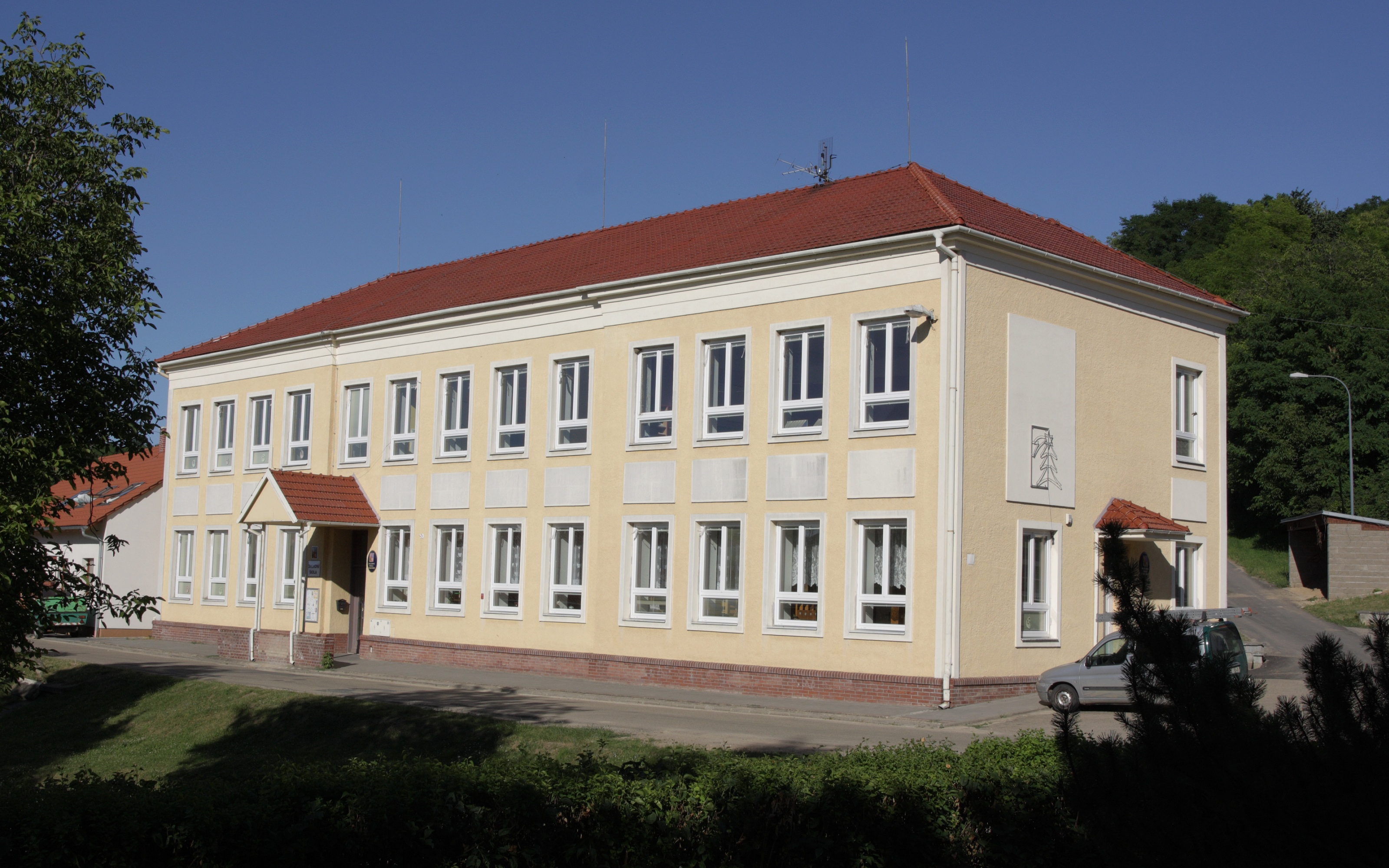 Borkovany - škola a obecní úřad.